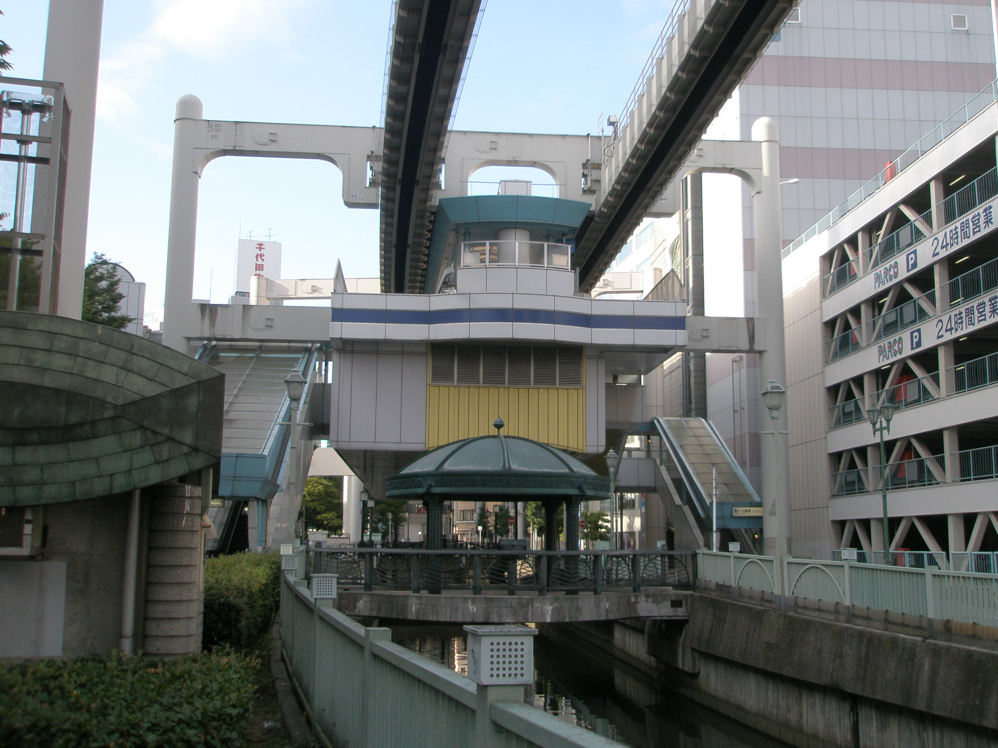 千葉都市モノレール葭川公園駅北側から(2008年8月22日)